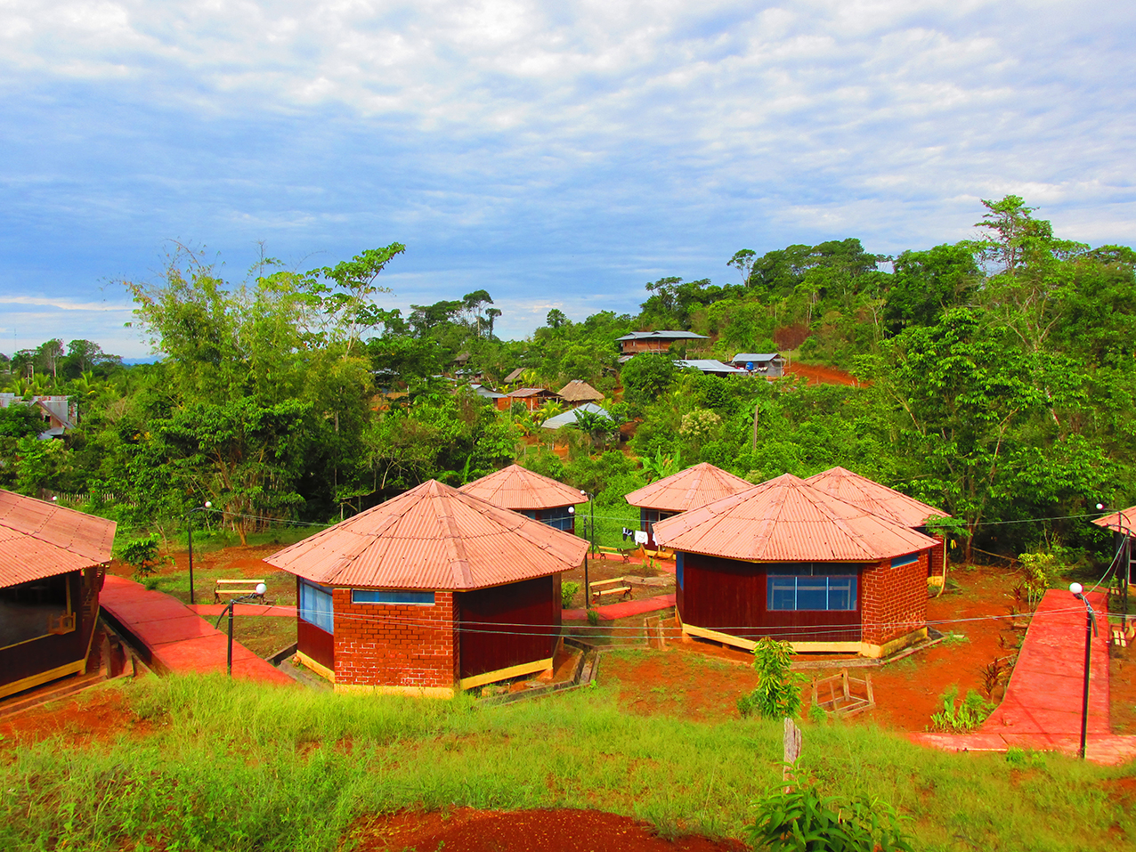 Asocciacion de viviendas municipal comunal Yamizu